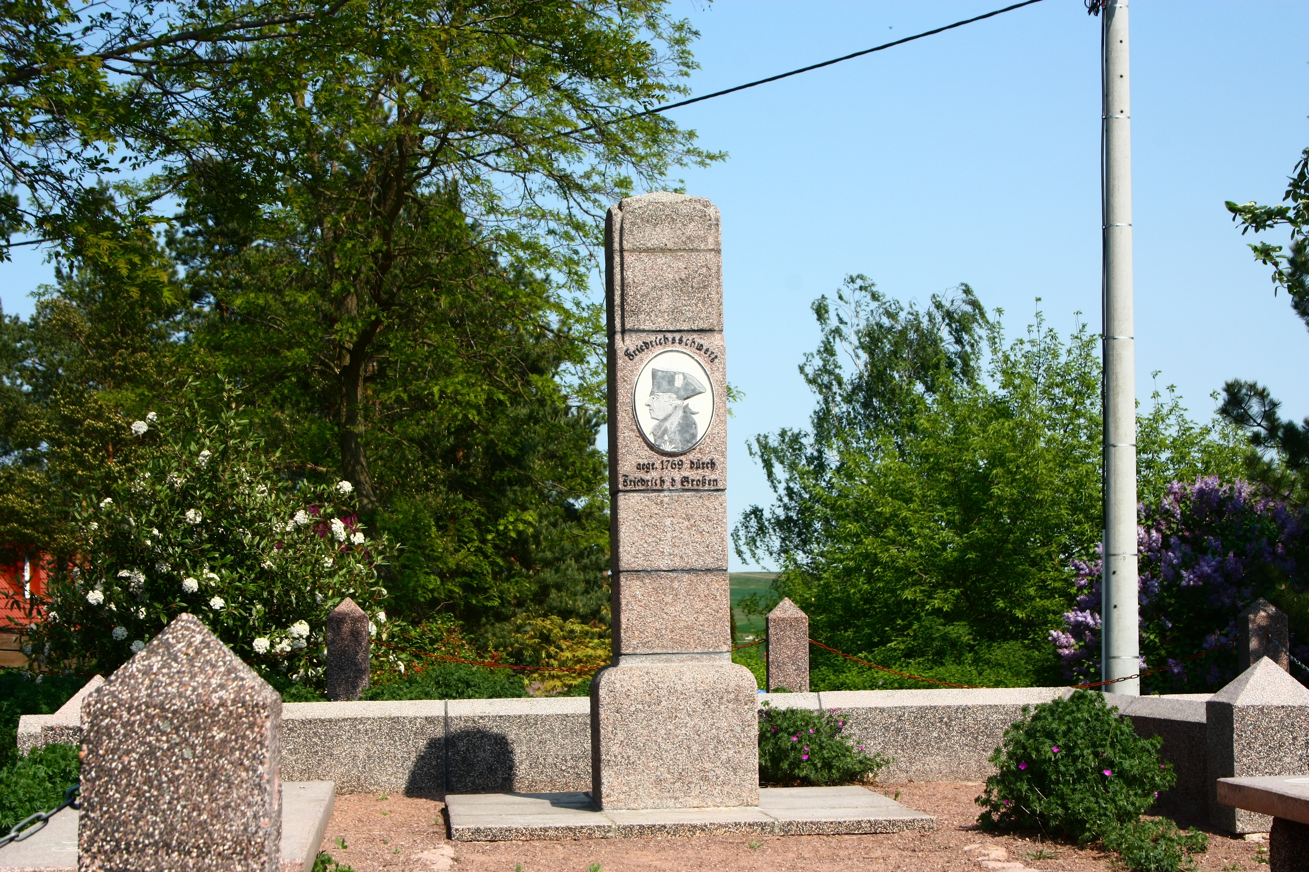 das Denkmal in Friedrichsschwerz bei Brachwitz über die Gründung des Ortes durch Friedrich den Großen 1769